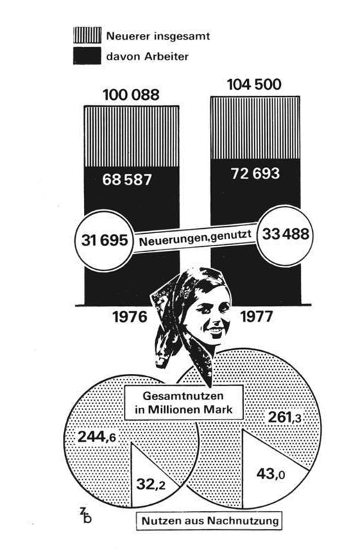 ADN-ZB Grafik 10.5.1978-Die Erfüllung der großen Aufgaben, die der IX. Parteitag der SEG den Werktätigen der Land- und Nahrungsgüterwirtschaft zur Sicherung einer gesunden Ernährung unseres Volkes stellte, hat auch die Initiative der Neuerer herausgefordert. 165.000 Neuerer und Rationalisatoren in volkseigenen Betrieben der Landwirtschaft, landwirtschaftlichen Produktionsgenossenschaften und kooperativen Einrichtungen haben sich allein 1977 schöpferisch betätigt. Besonders hoch ist der Anteil der Neuerer in den volkseigenen Betrieben und Einrichtungen der Landwirtschaft. Quelle: Presse-Informationen Nr. 38 vom 30.3.78